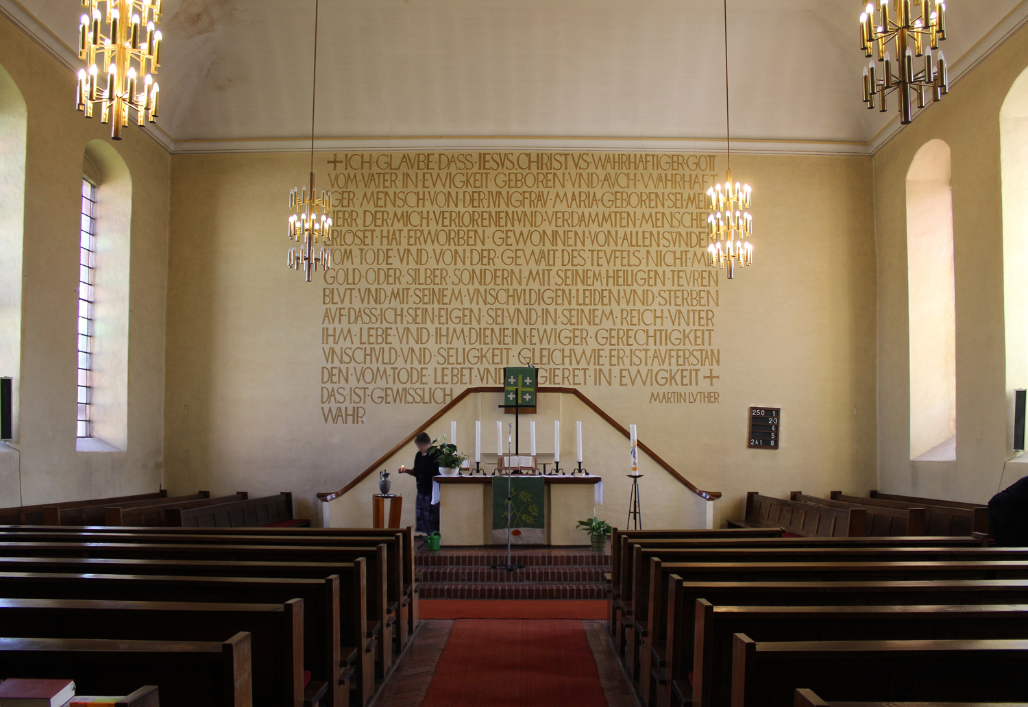 Blick ins Innere der evangelischen Kirche in Sötern, Gemeinde Nohfelden, Landkreis St. Wendel, Saarland